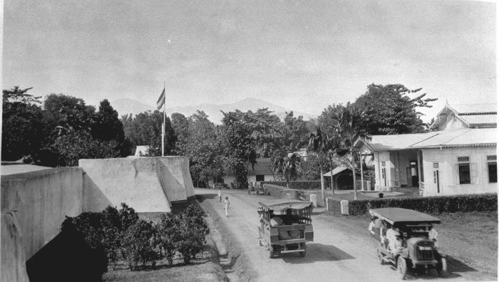 Foto. Een straat in Menado met aan de linkerzijde het fort Menado en aan de rechterkant de sociëteit